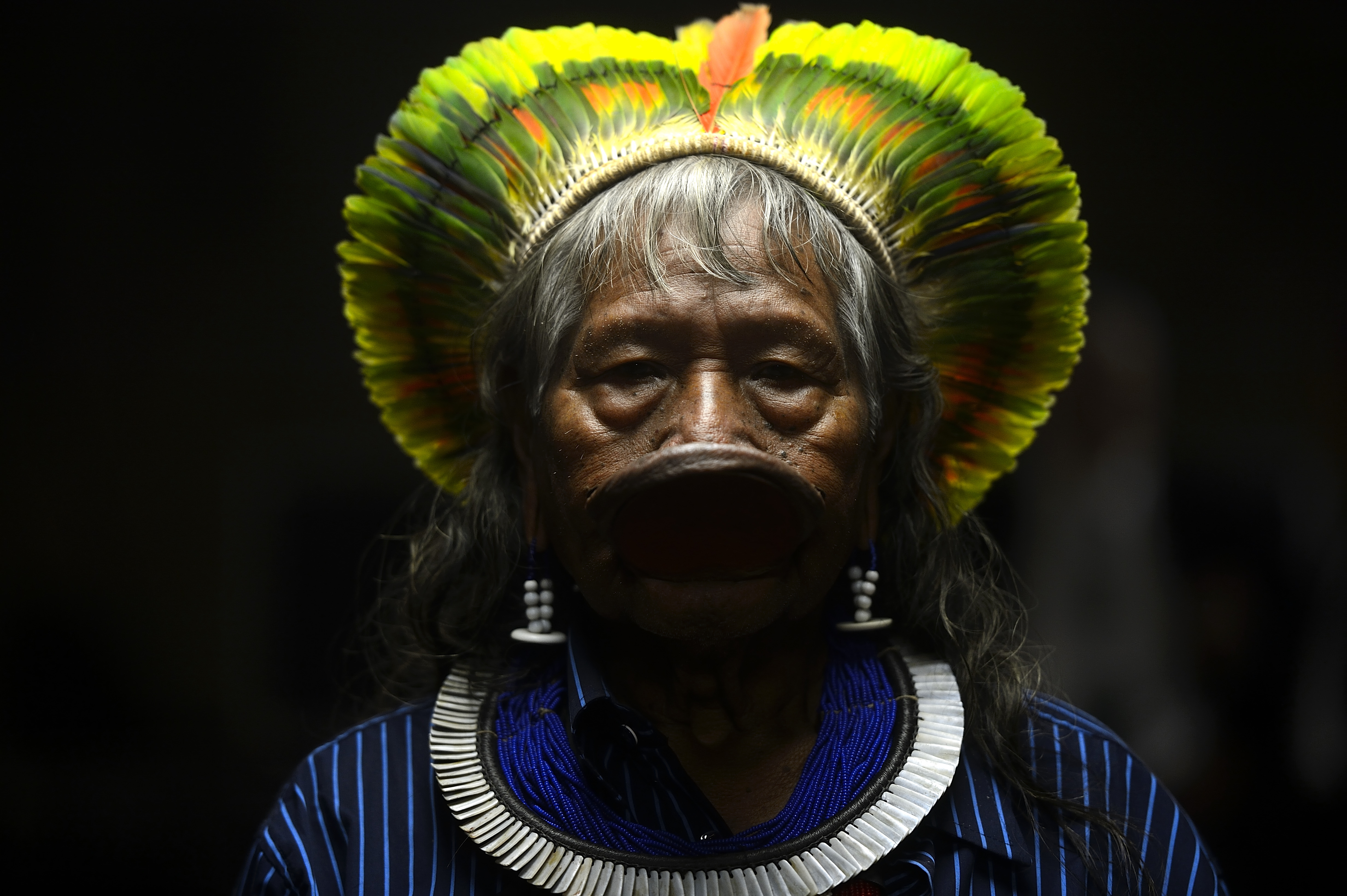 Rio de Janeiro - O cacique Raoni Metuktire, líder indígena brasileiro da etnia caiapó, participa do 1º Congresso Mundial de Direito Ambiental, no Tribunal de Justiça do Estado do Rio de Janeiro (TJRJ) (Fernando Frazão/Agência Brasil)